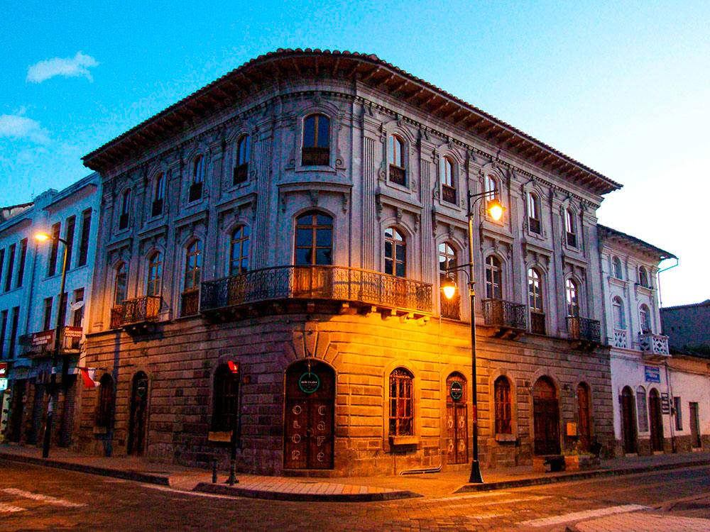 Casa de la Iberrañidad, en Ibarra, Eucador.